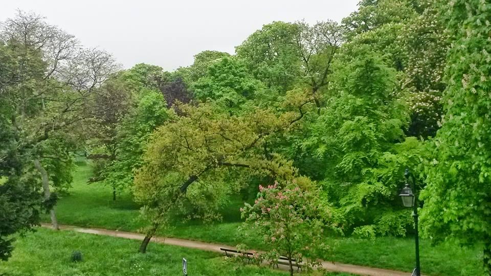 View on the Vincennes Forest from the Chaussée de l’Étang, Saint-Mandé, 94160, France